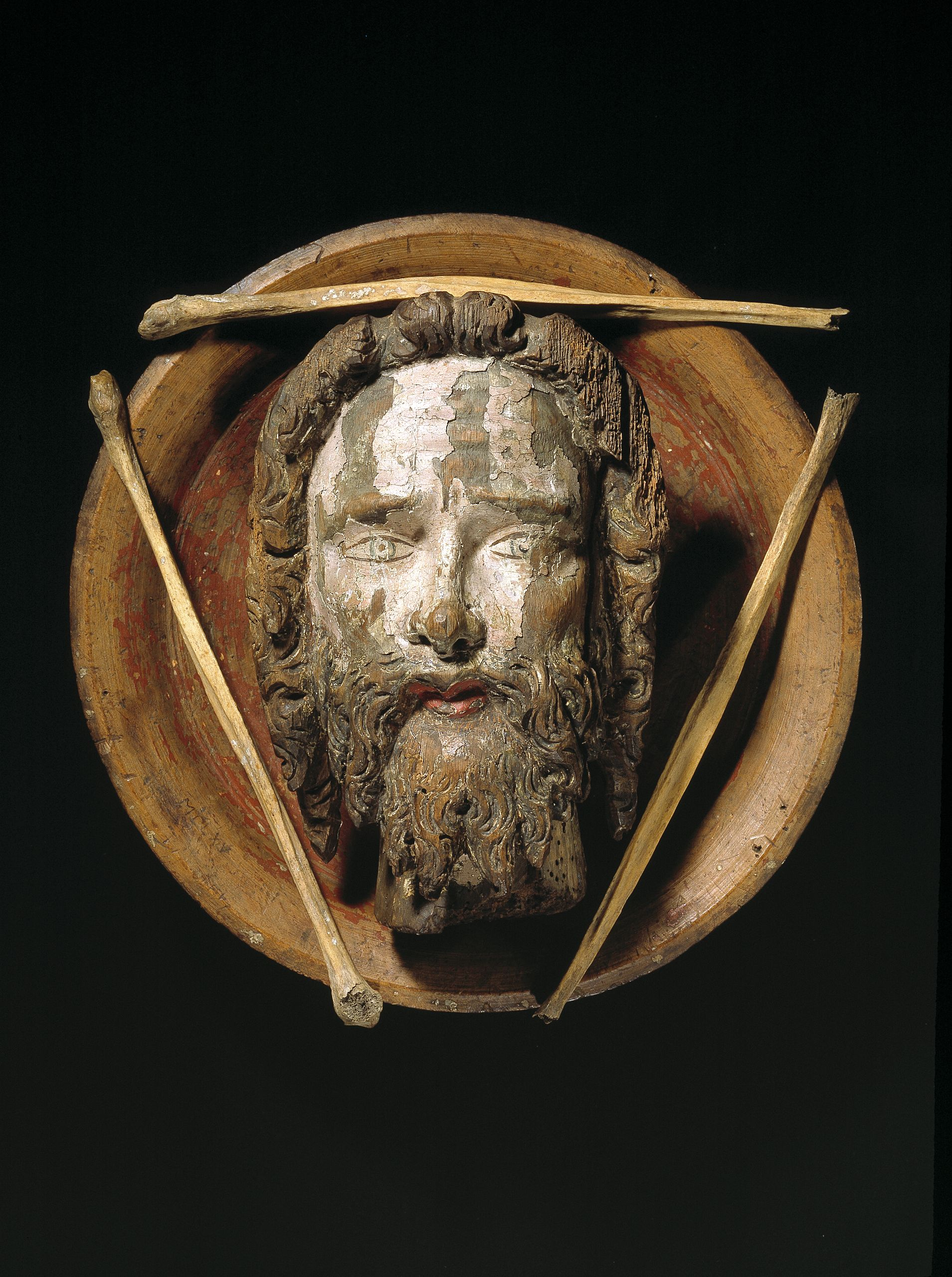 Johannes Døberens hoved på et fad fra Ørslev Kirke på Sydvestsjælland. Træhovedet med de tre menneskeknogler blev båret i optog til en hellig kilde Skt. Hans (Johannes) aften, også efter reformationen. Datering: Hovedet er fra 1450-1500. (Fadet er fra 1625).